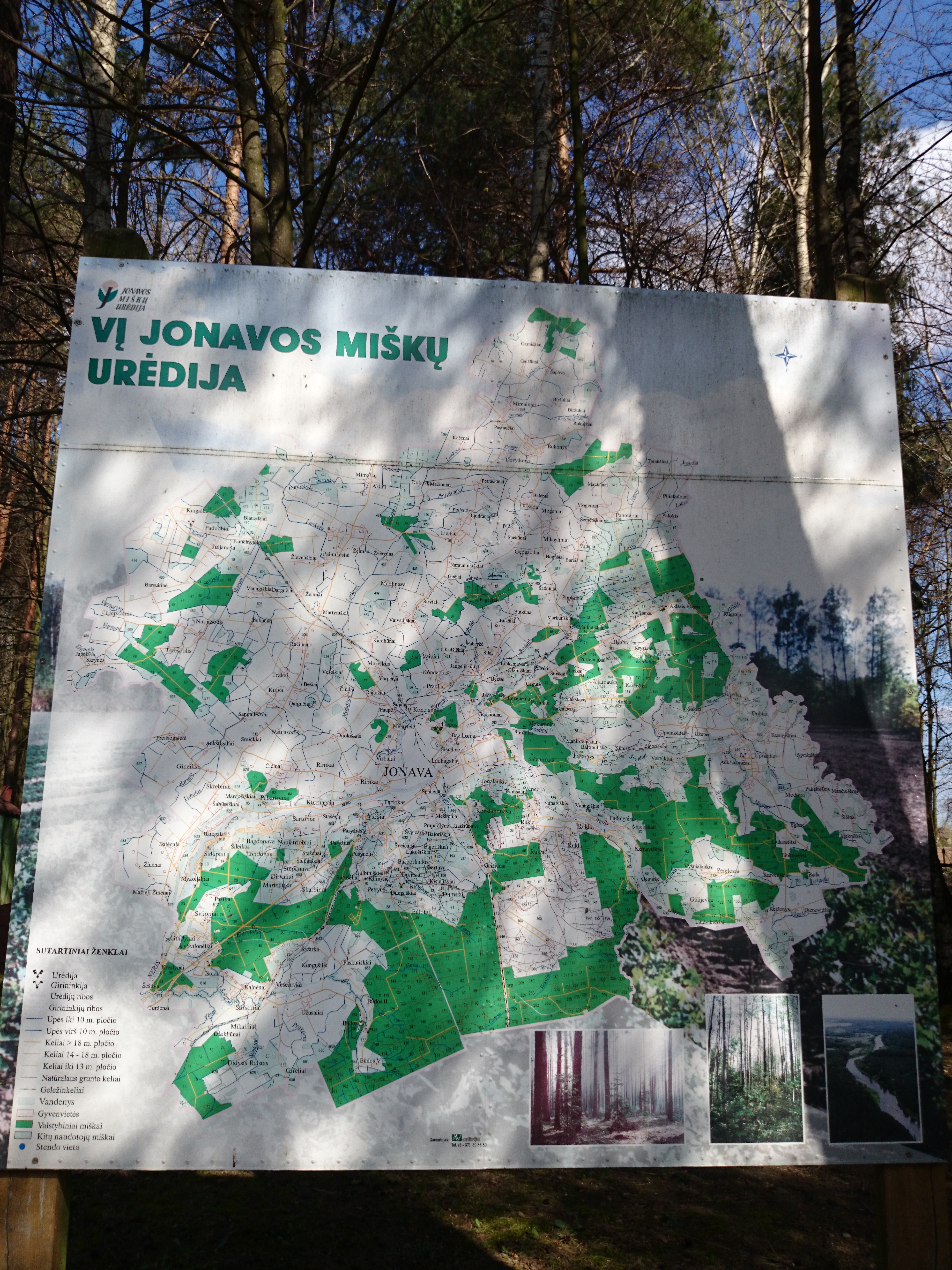 Jonava Forestry